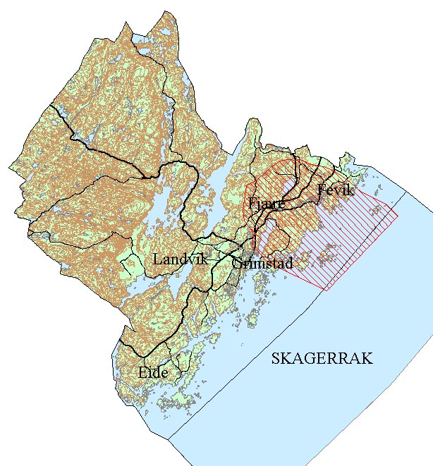 Fjaere granite, geographic area.